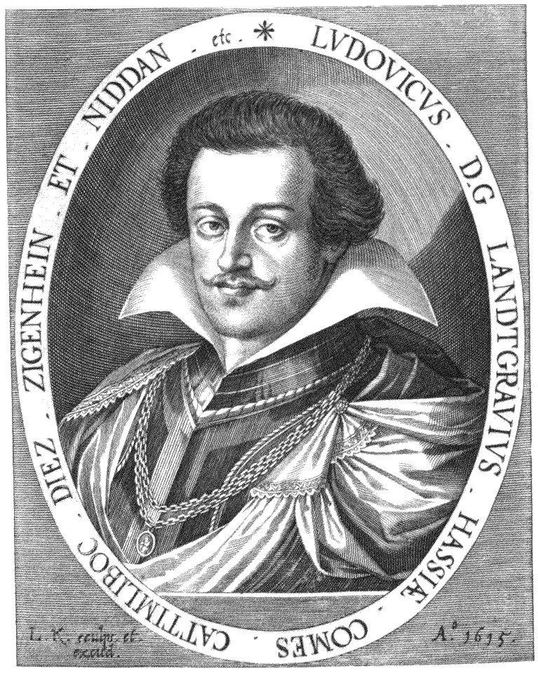 Ludwig V., Landgraf von Hessen, nach einem Stich von L. Kilian